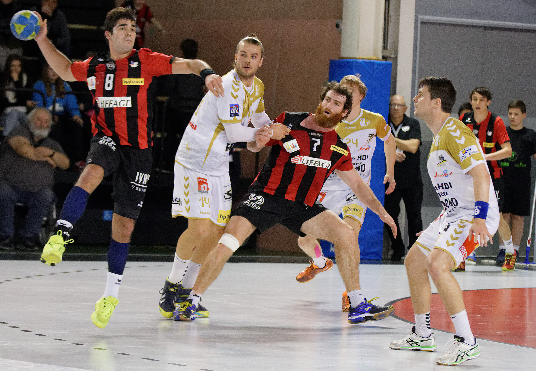 Ivry - Saint-Raphaël lors de la 19e journée du championnat de France de handball masculin le 23 mars 2016 au gymnase Auguste Delaune à Ivry sur Seine.